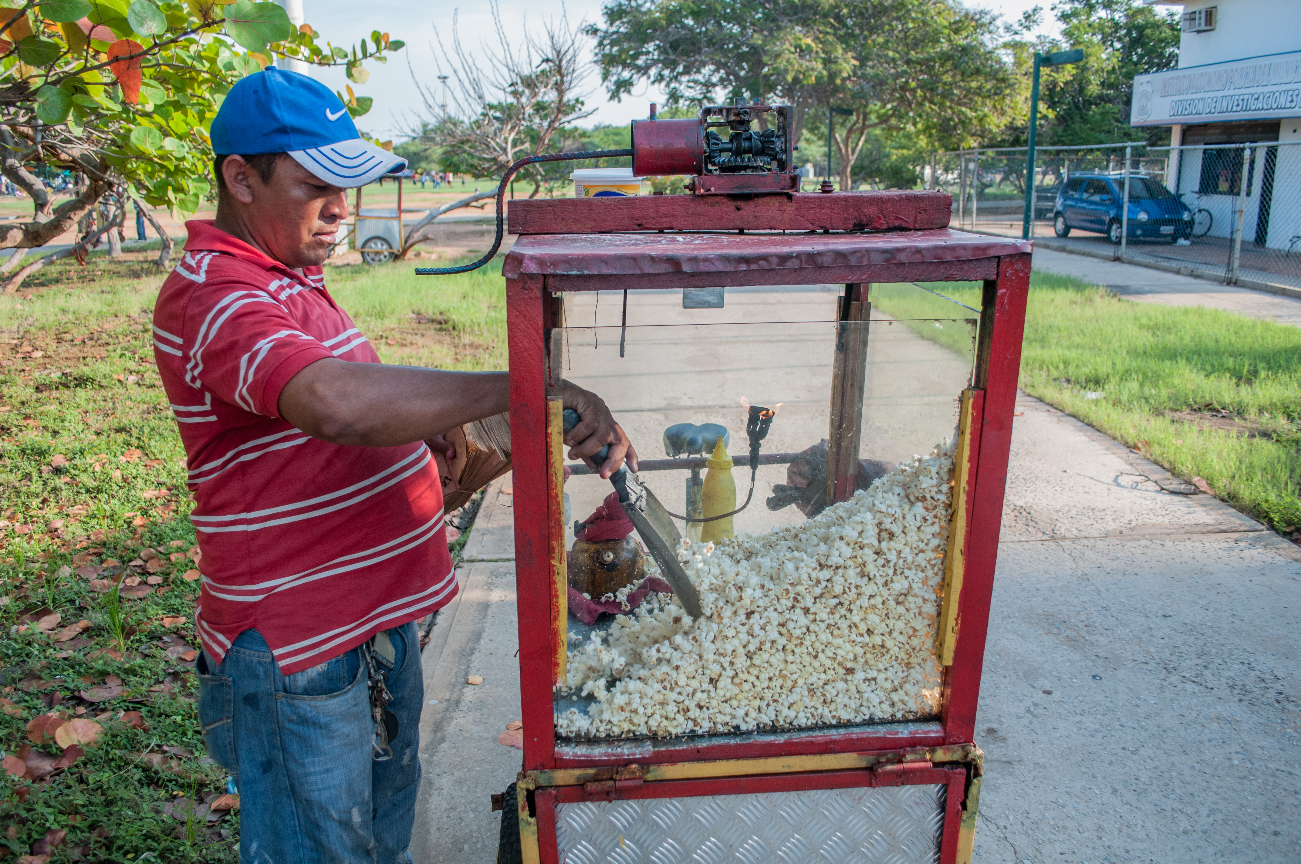 Vendedor de Palomitas de Maiz